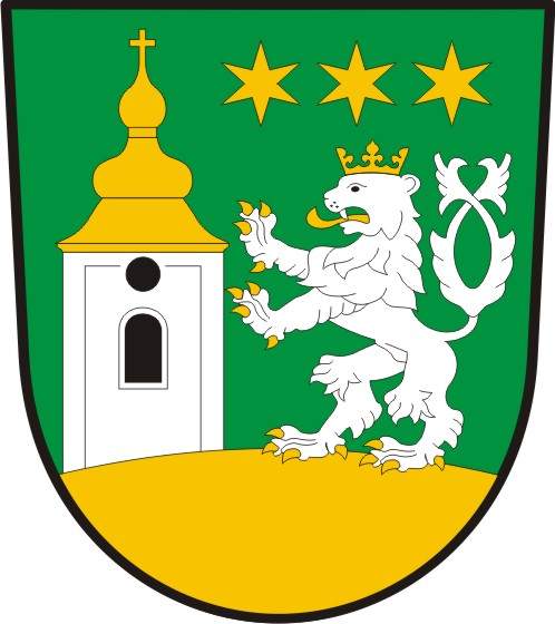 Znak obce Kohoutov, okres Trutnov